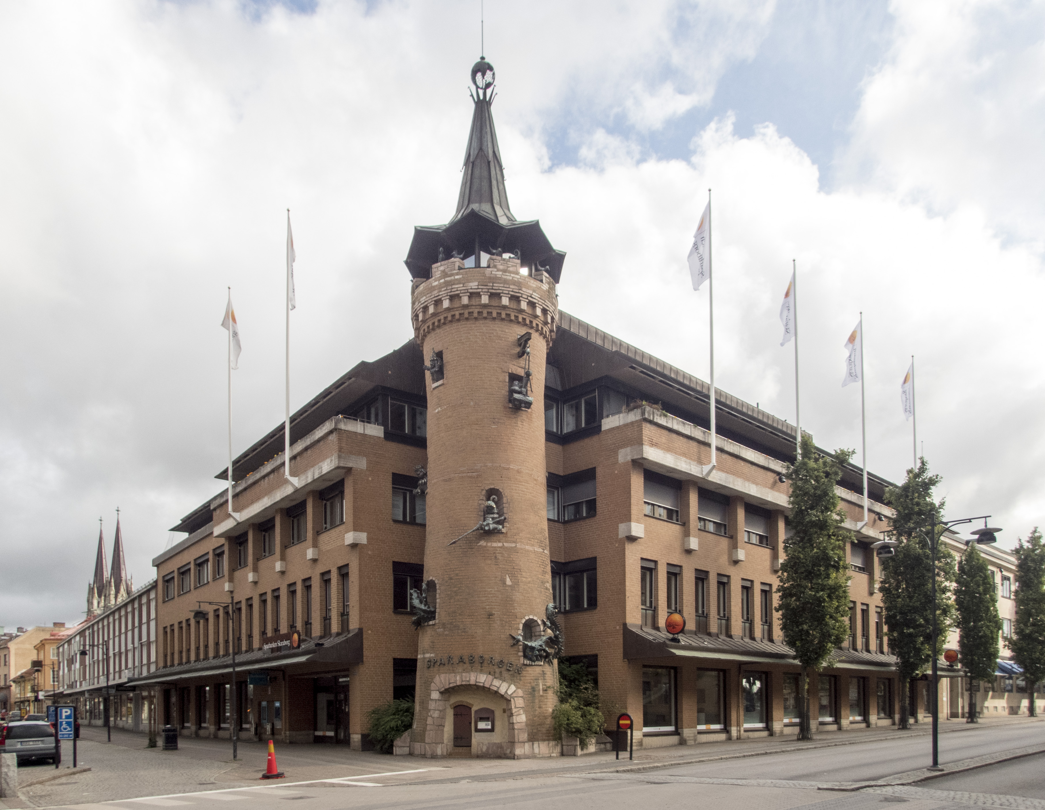 Sparbankshuset, Skara. Byggnadsår 1984. Arkitekt Bengt Hultmark